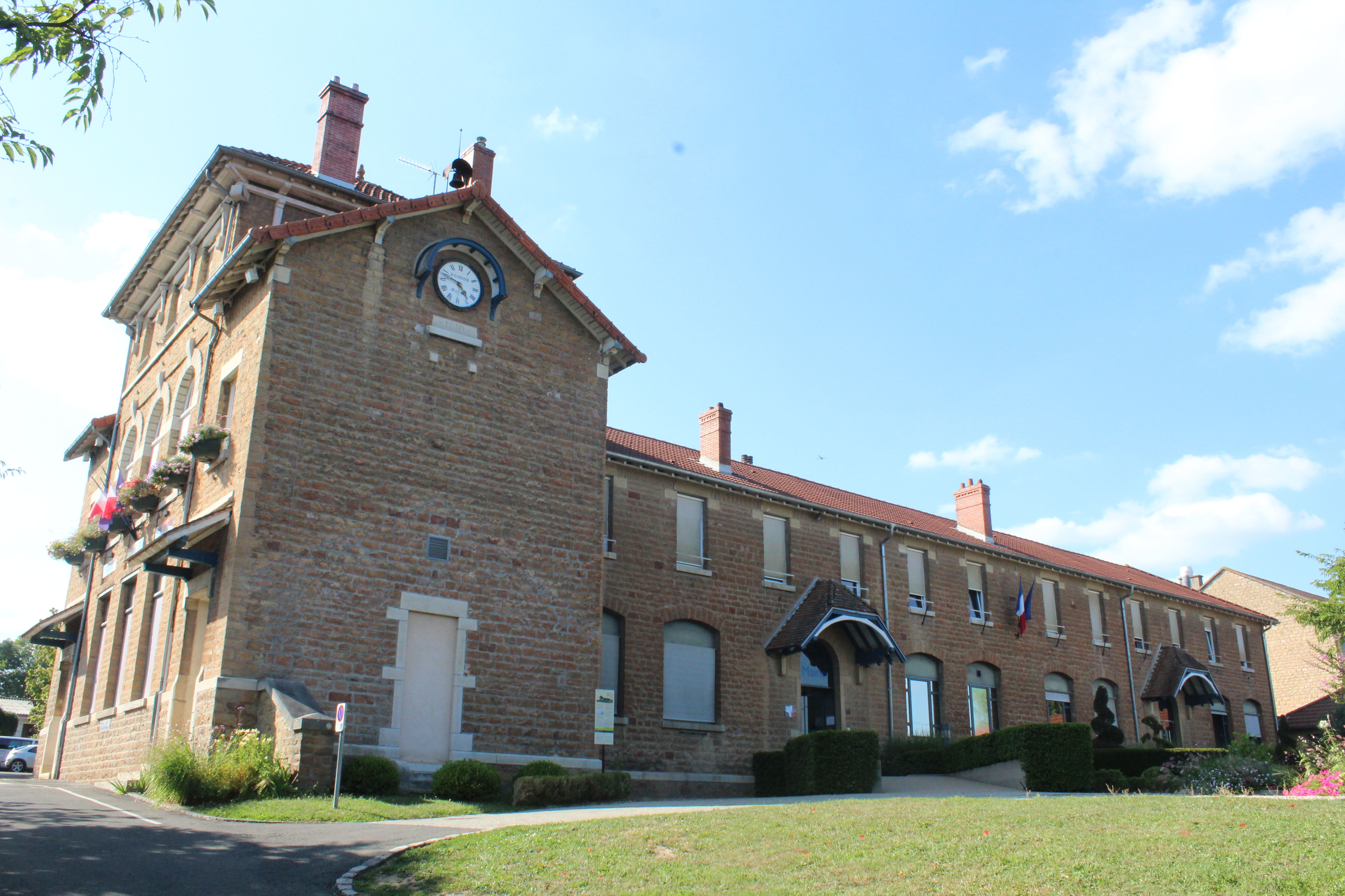 Mairie de Charnay-lès-Mâcon.